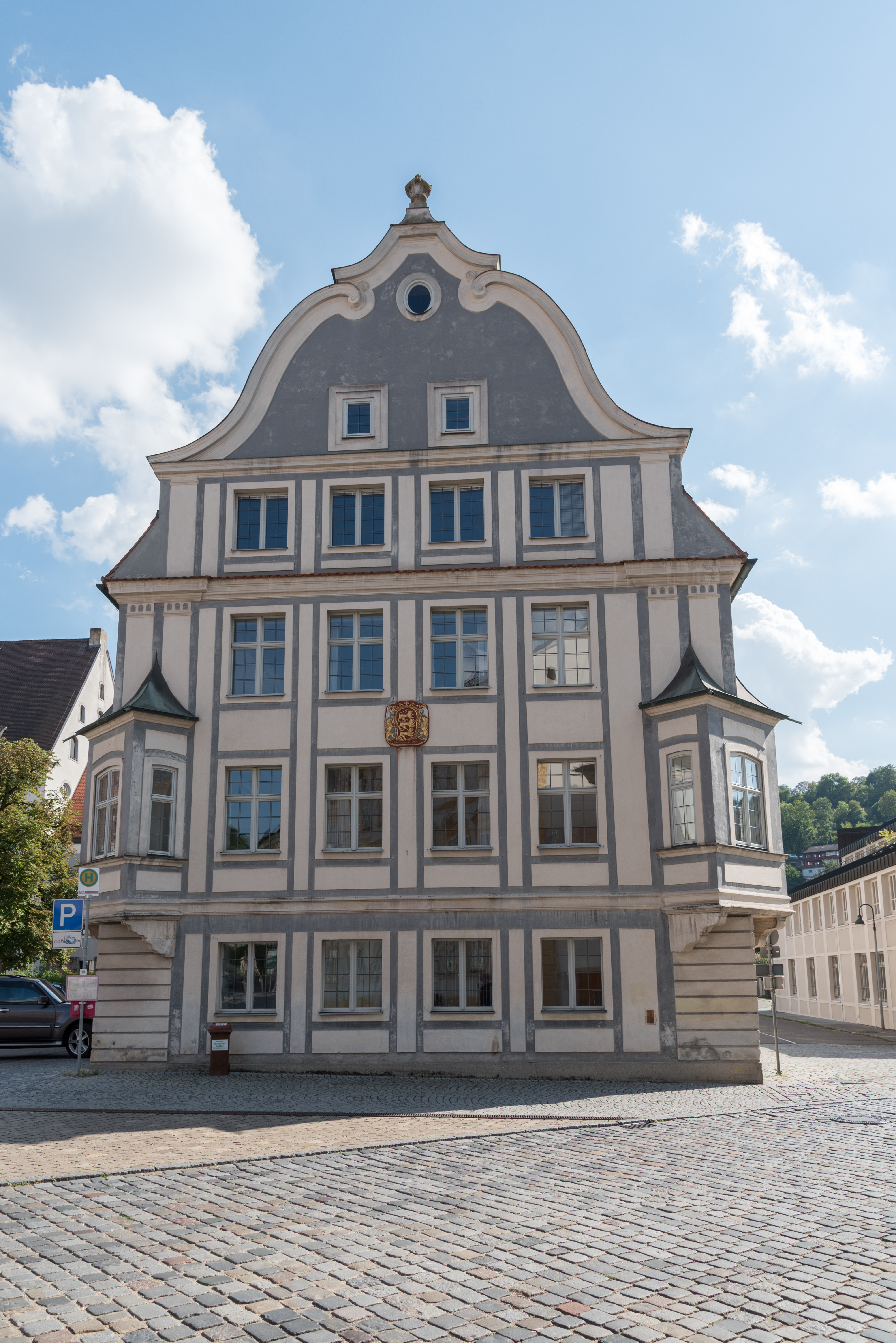 Eichstätt, Leonrodplatz 4